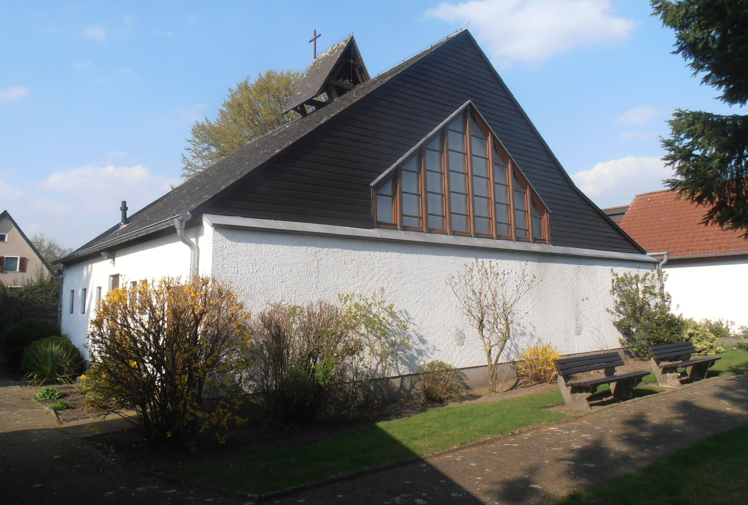 Die Gnadenkapelle in Ascheberg, Blick von Südwesten